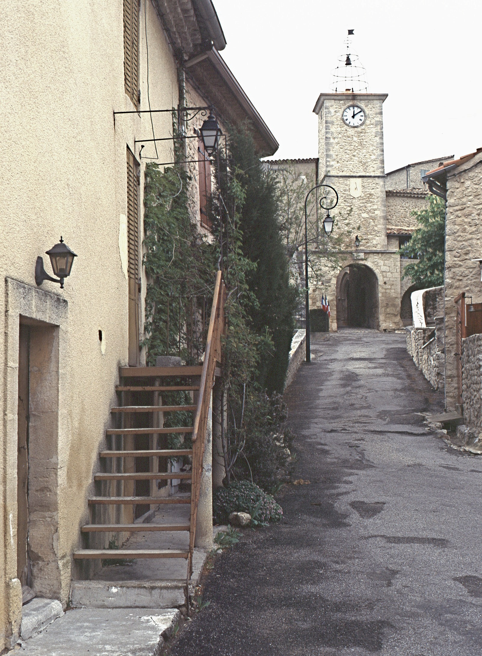 Tour de l’Horloge à Lurs